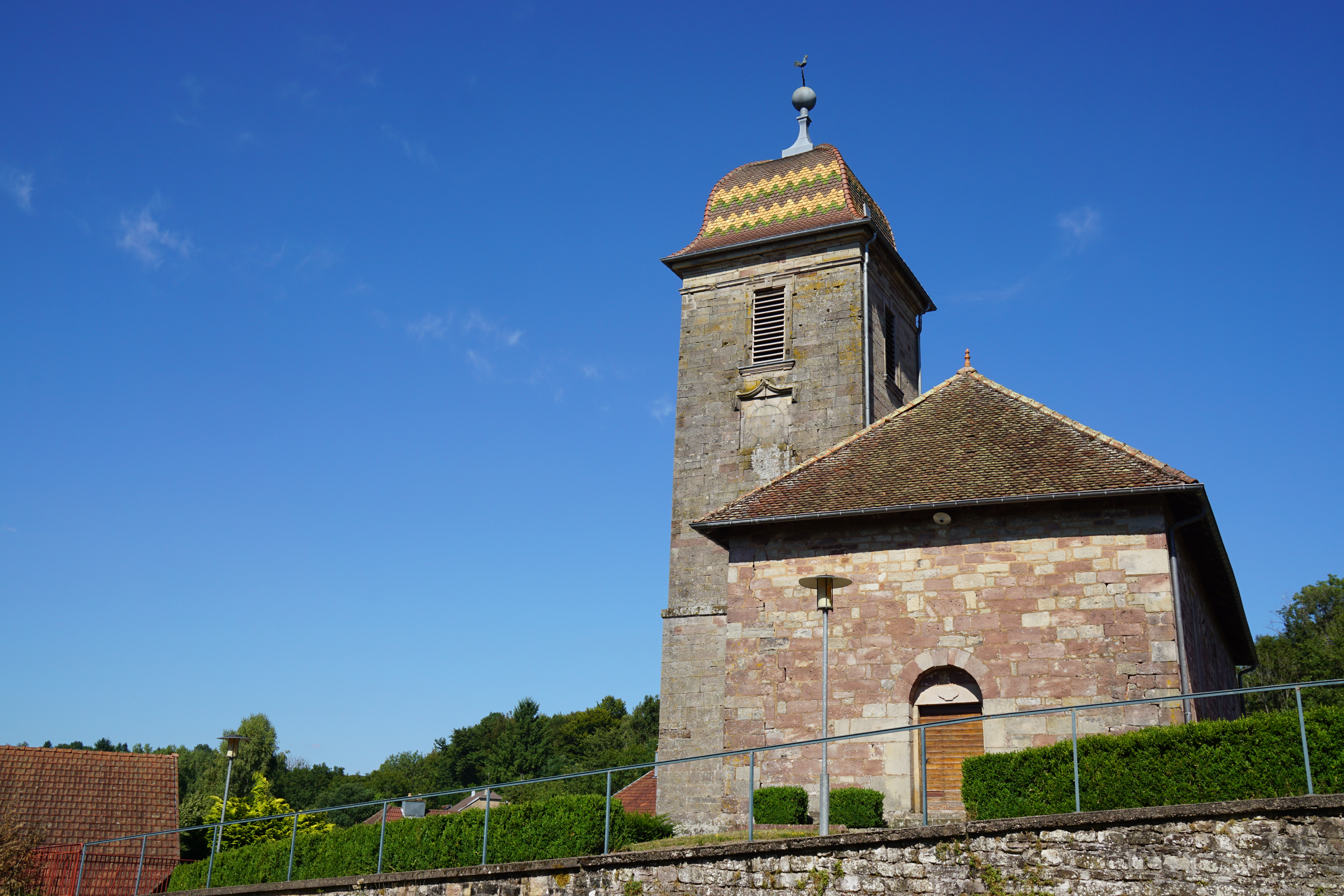 Le temple luthérien de Clairegoutte.